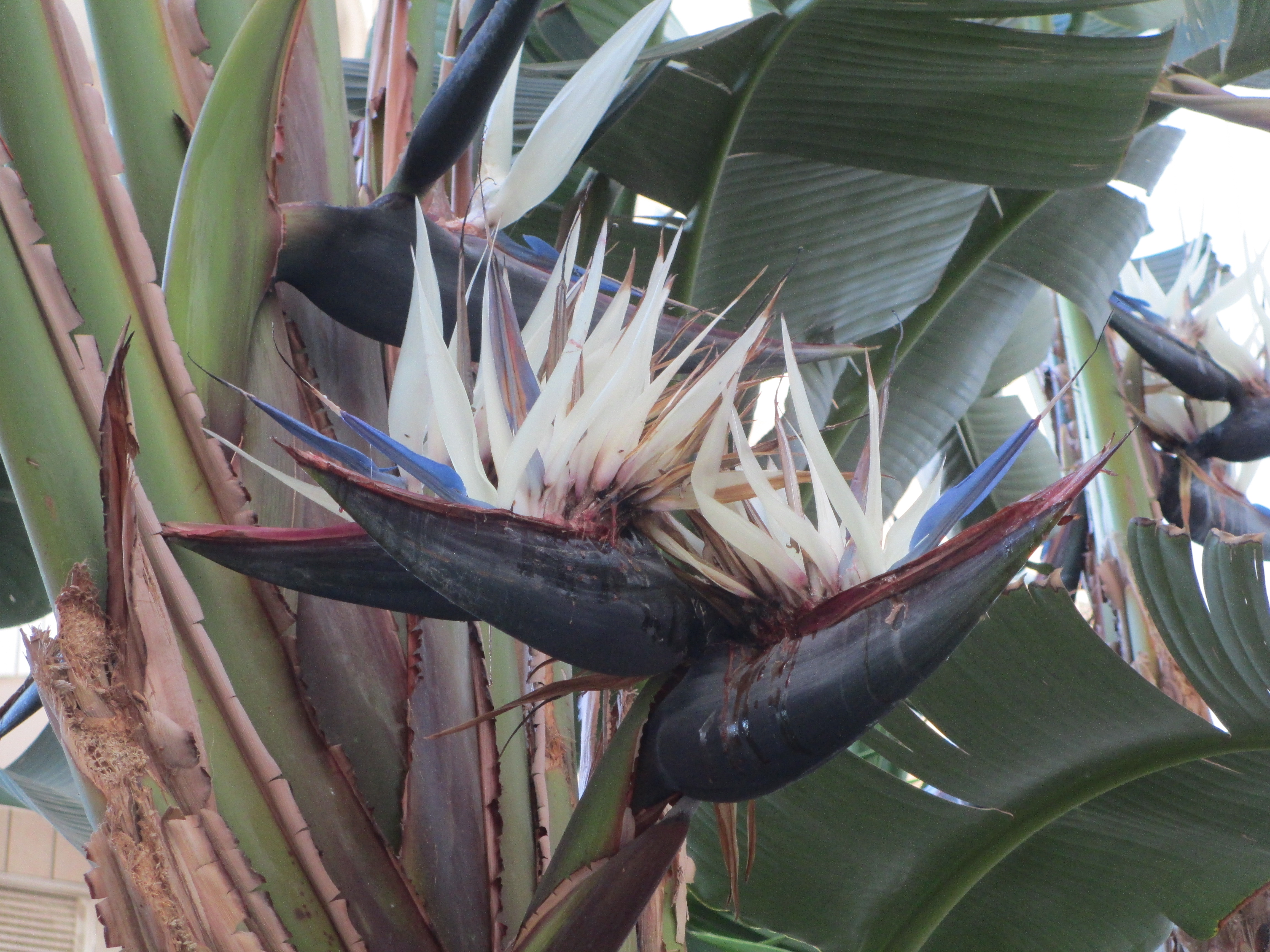 סטרליציית ניקולאי